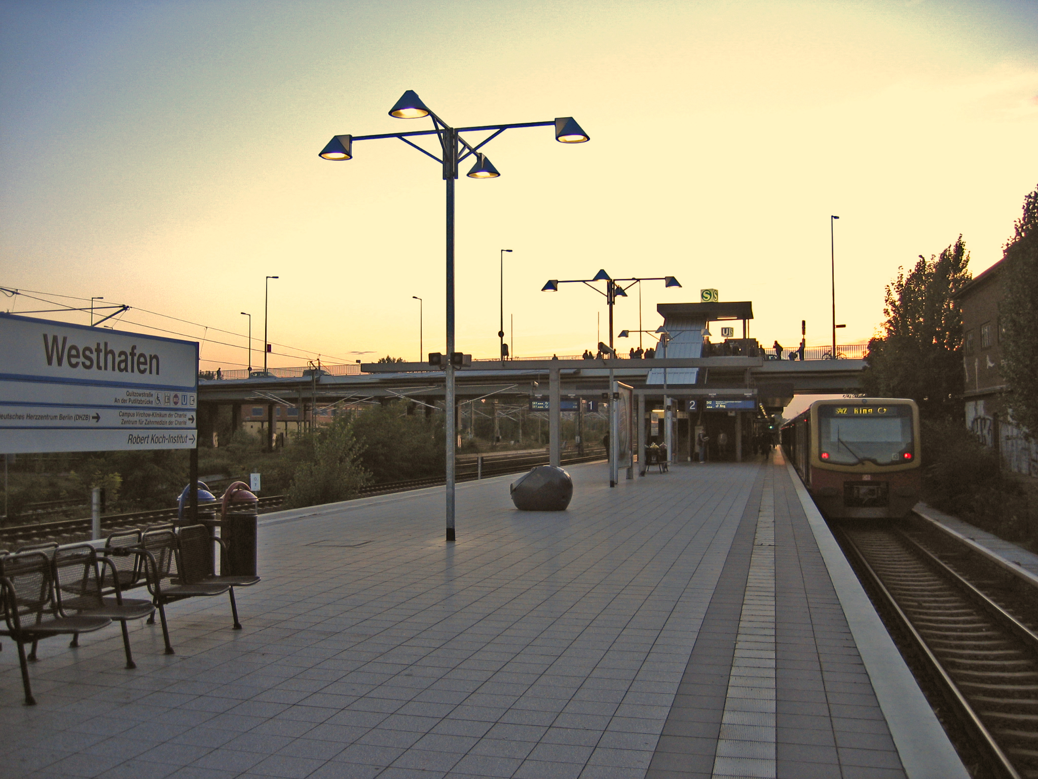 S-Bahnhof Berlin Westhafen